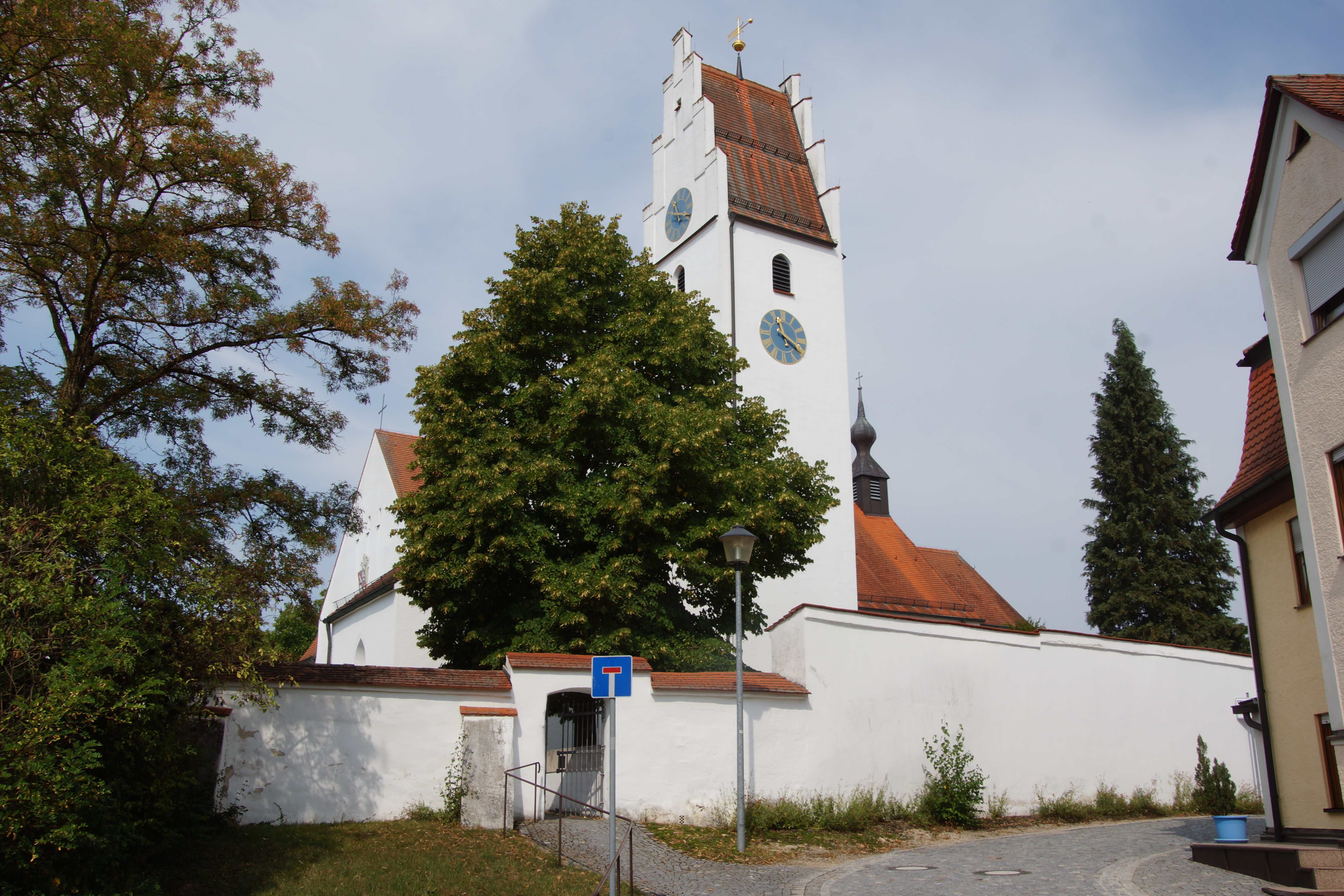 Die alte katholische Pfarrkirche von Oberhaunstadt